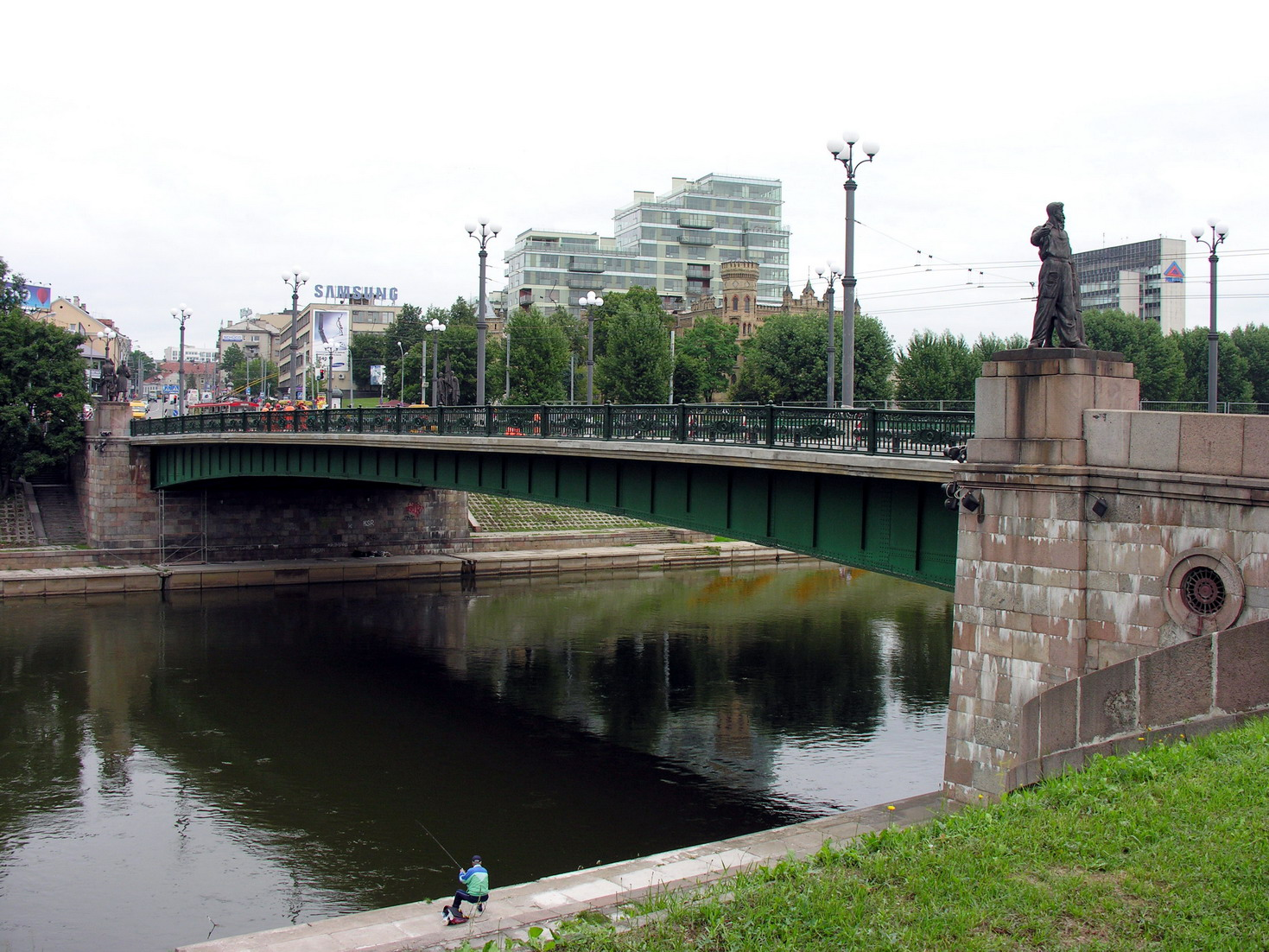 Vilnius Žaliasis tiltas Foto: Algirdas, 2006 m. rugpjūčio 8 d., Lietuva